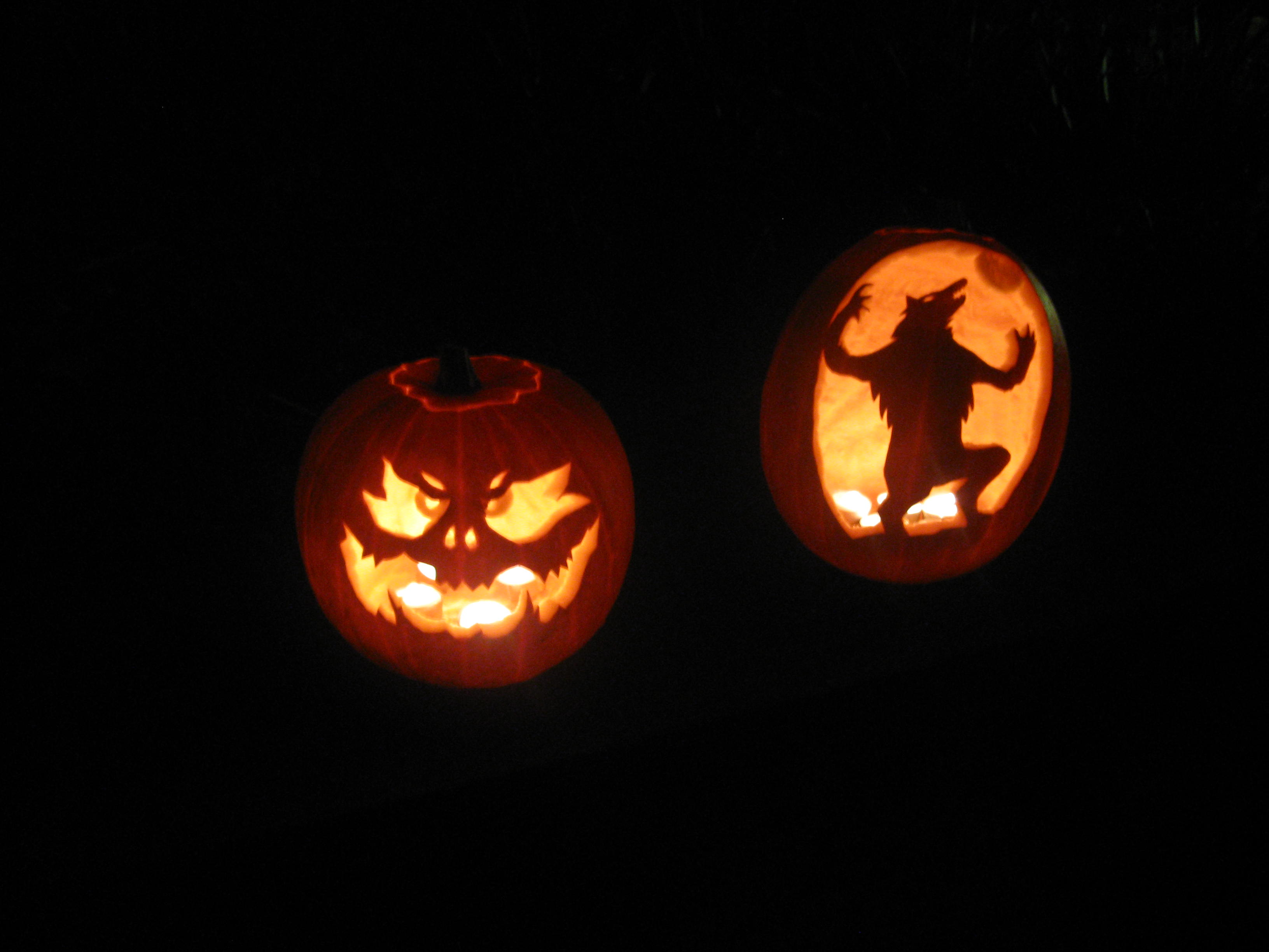 Uitgeholde pompoenen: een stereotiep gezicht en een iets ongewonere figuur